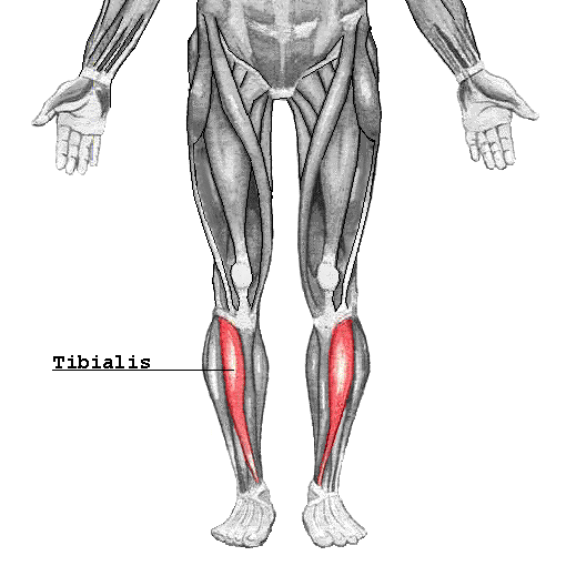 Tibialis är en muskel som sitter på framsidan av smalbenet.